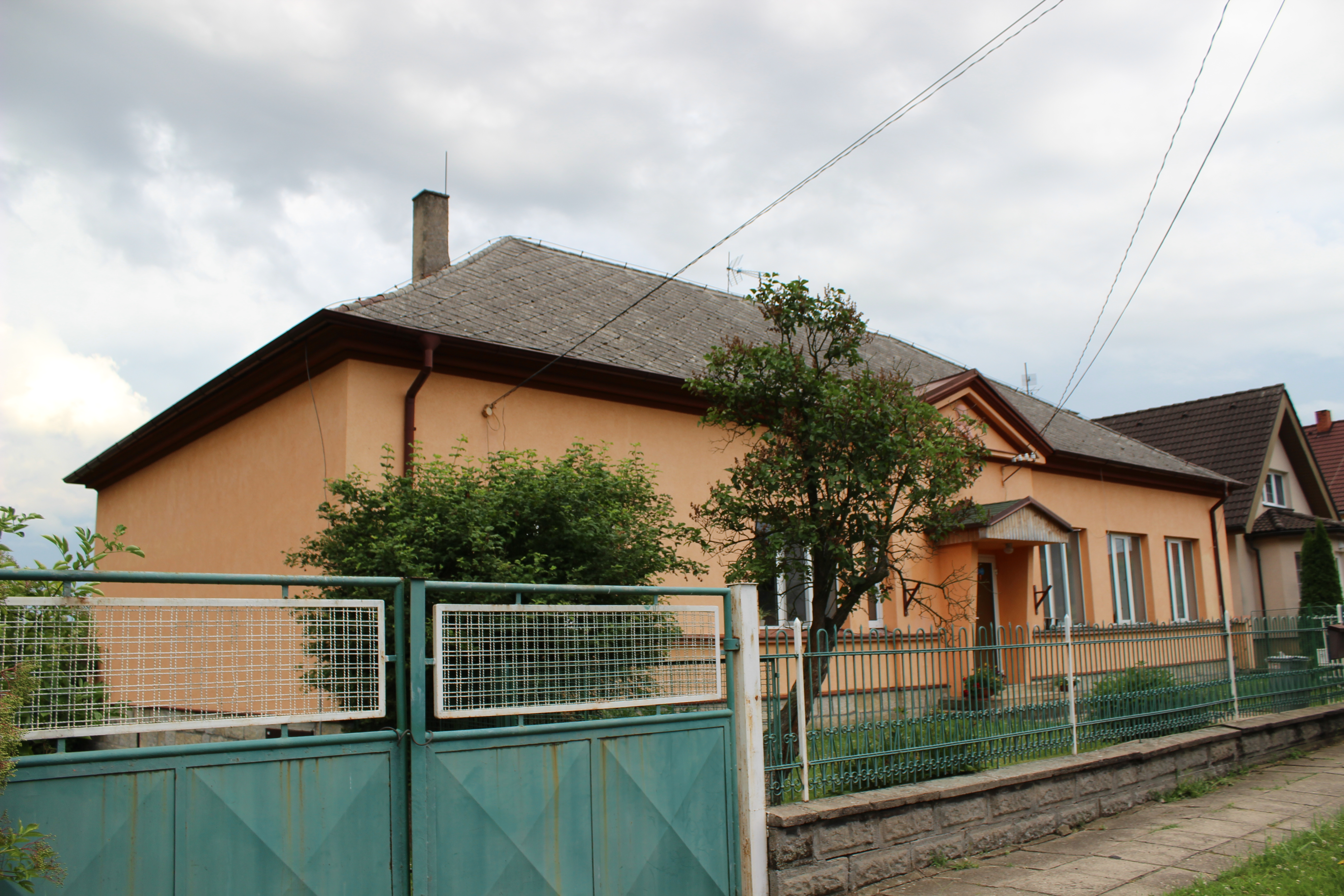 Mateřská škola (dům číslo popisné 36) ve Strašnově, okrese Mladá Boleslav.